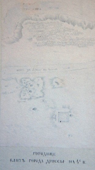 Беларуская (тарашкевіца): Дрыса (Drysa). Гарадзішча